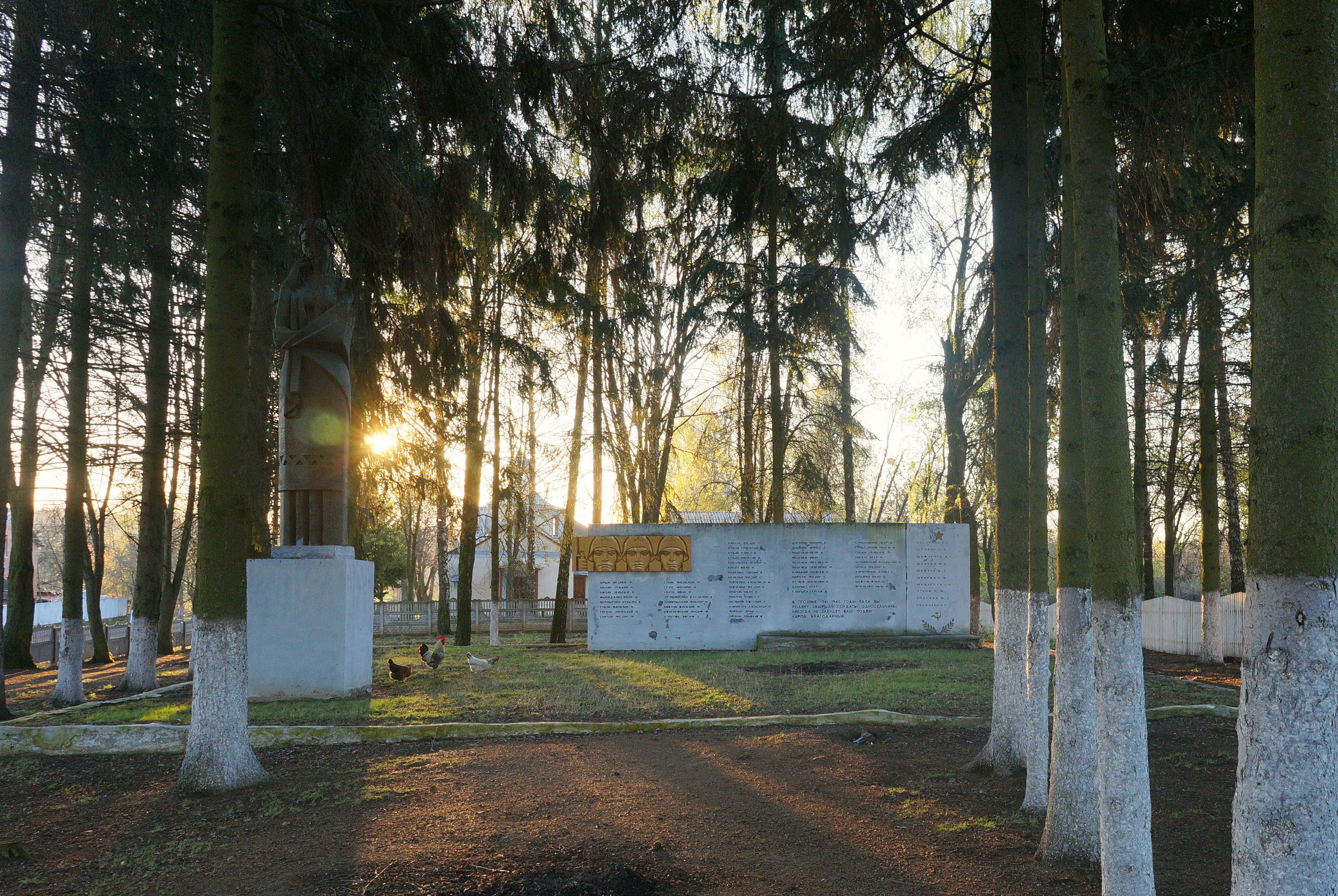 Пам’ятник 61 воїнам- односельчанам, загиблим на фронтах ВВВ, Сербинівці, вул. Центральна